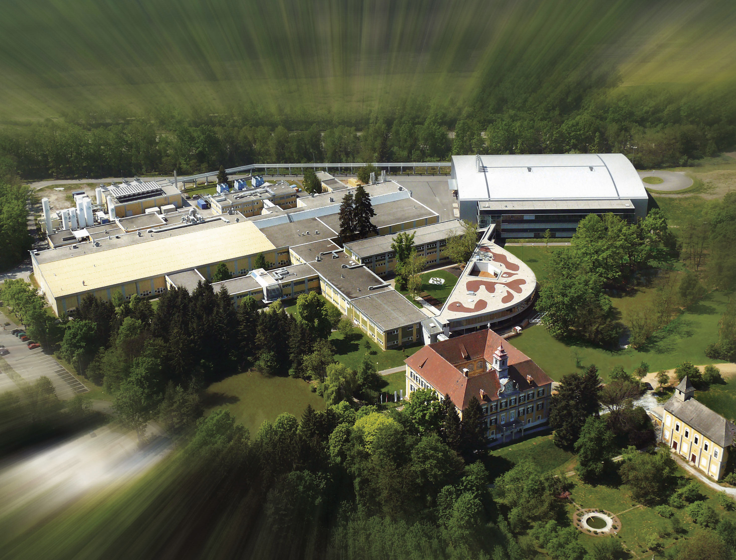 Headquarters Unterpremstätten